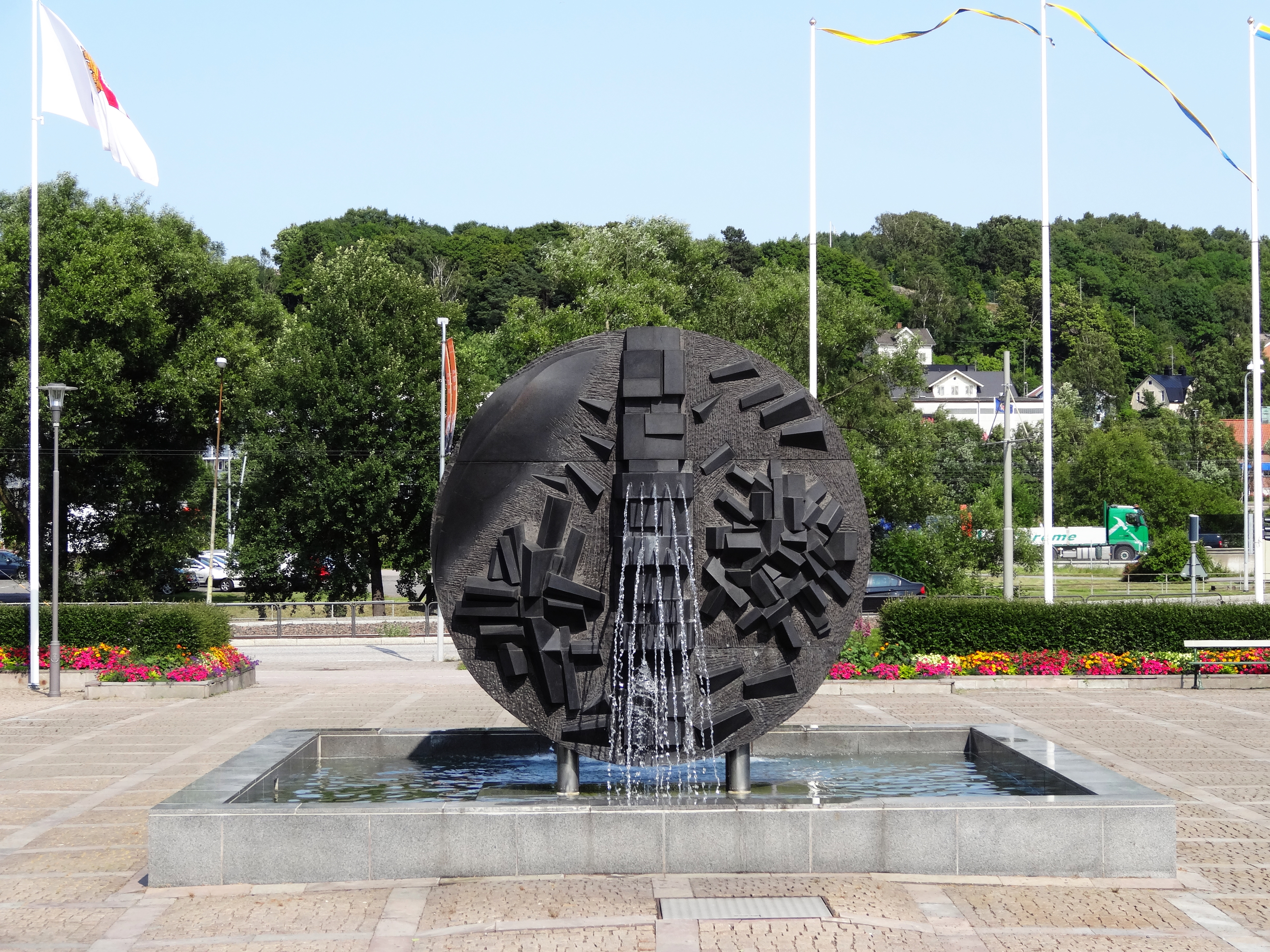 Faesberghia av Roland Anderson på Stadshusplatsen i Mölndal.